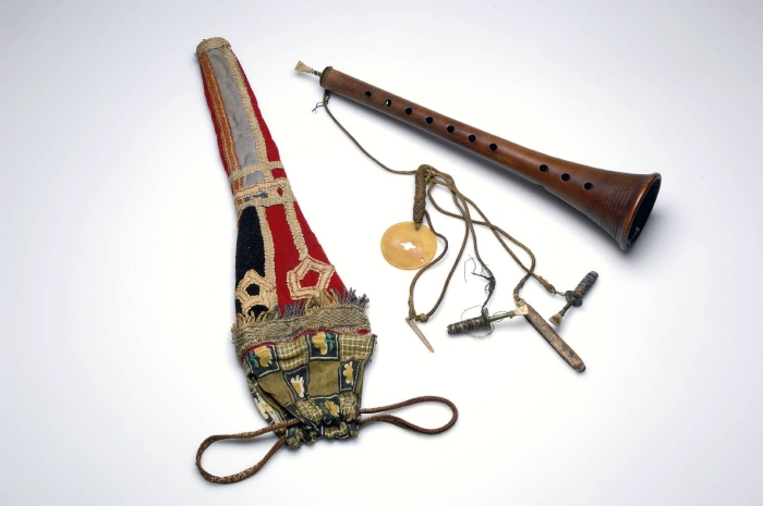 Deze houten schalmei (dubbelriet) heeft 7 vingergaten in het rechte gedeelte en 7 klankgaten (3+2+2) in het trechtervormige gedeelte. Er zijn in totaal 3 rieten: 1 ervan is in het klanklichaam gestoken, twee losse reserve-exemplaren zijn met touwtjes hieraan bevestigd. Elk riet is in een koperen cylindertje geschoven; halverwege bevindt zich een messingen plaatje, terwijl het cylinderdeel eronder (de stop) is omwikkeld met dun touw. Verder zitten met touwtjes vast aan het klanklichaam: een klemmetje van 2 aan elkaar gebonden stokjes, waarschijnlijk om de rieten in vast te zetten zodat ze niet beschadigd raken, en een houten pennetje, dat dient om de rieten te openen als ze aan elkaar kleven. Om het instrument op te bergen is er een foudraal. Dor een speciale techniek (zg. 'circular breathing') kan de speler ademhalen onder het spelen, zonder het instrument uit de mond te nemen, en op die manier een ononderbroken geluid voortbrengen. (Volgens de literatuur zitten er bij dit soort instrumenten in het trechtervormige gedeelte 3 + 2 = 5 klankgaten.)